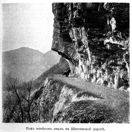 Старая Шатоевская дорога